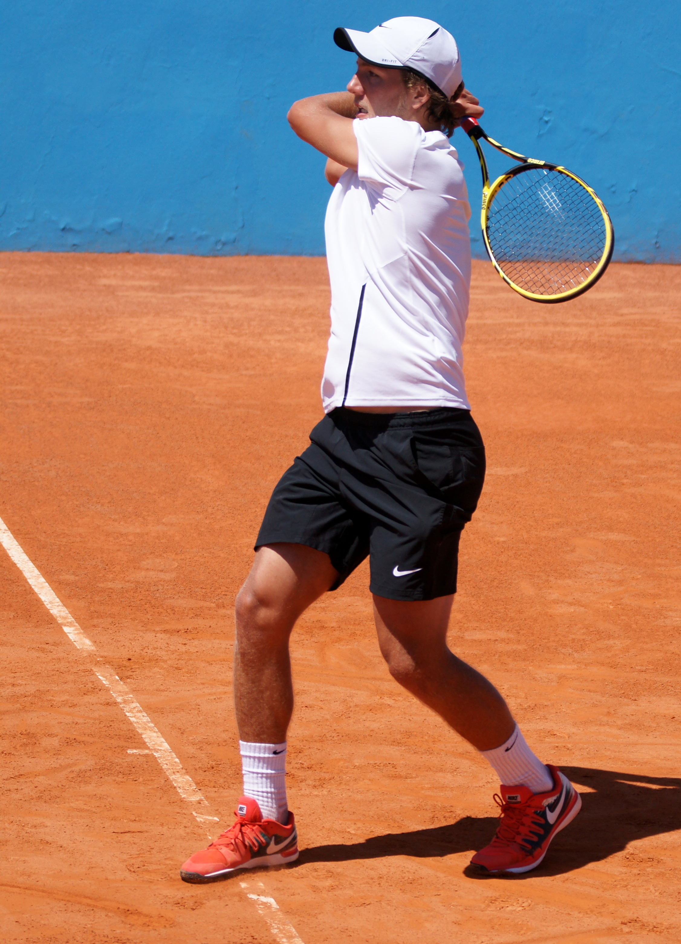 Lucas Pouille Nice Open ATP 2014